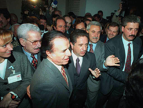 El presidente Carlos Menem asistió al lanzamiento oficial de la campaña del Partido Justicialista de la Capital Federal.